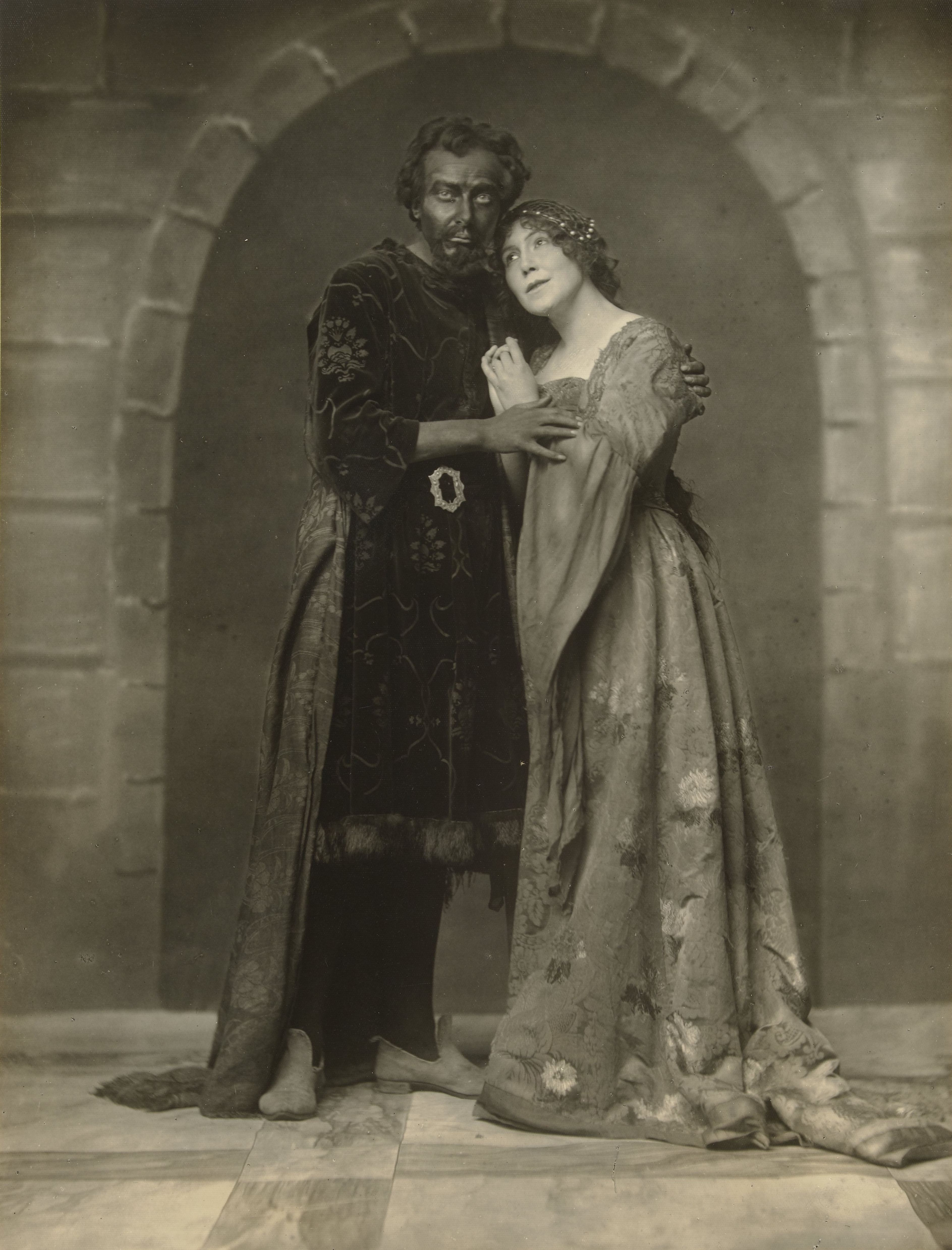 Het Groot Toneel speelde rond 1918 onder regie van Charles Gilhuys het toneelstuk Othello